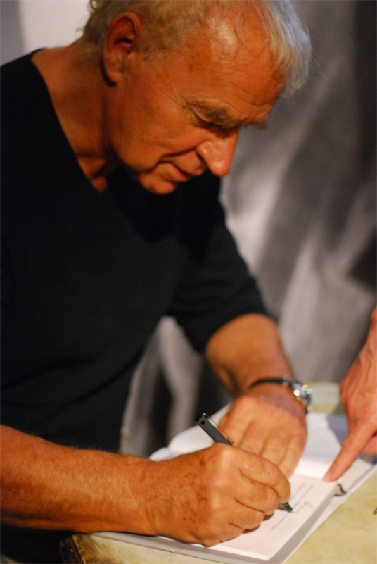 Janusz Głowacki podczas Literaturomanii 2009.